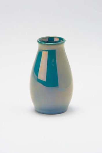 Vaasje met lusterglazuur van de Utrechtse Kunstaardewerkfabriek St. Lukas, hoogte circa 9cm.